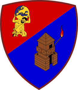 Scudetto del Comando Trasmissioni dell'Esercito.